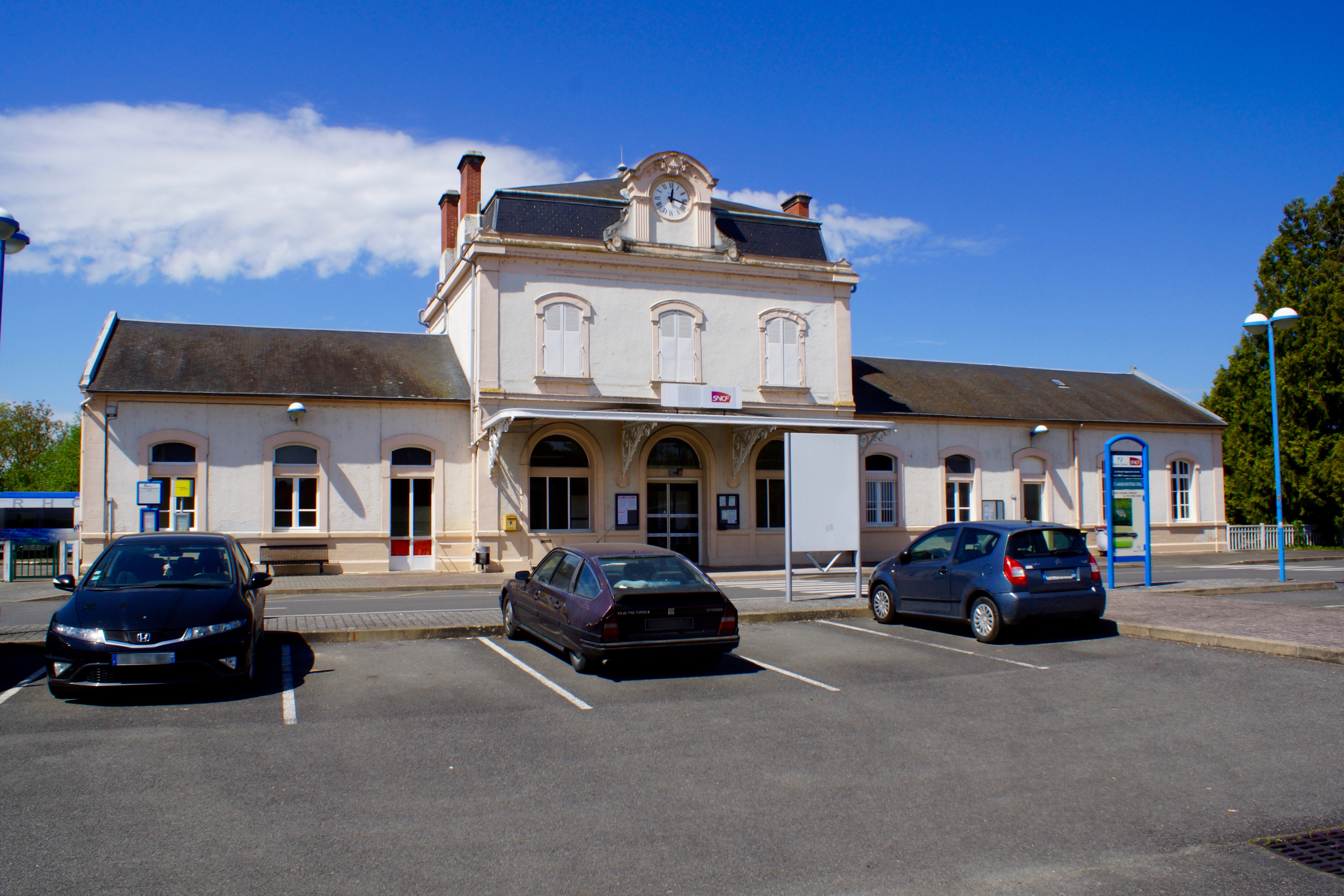 Le bâtiment voyageurs vue de la cour.